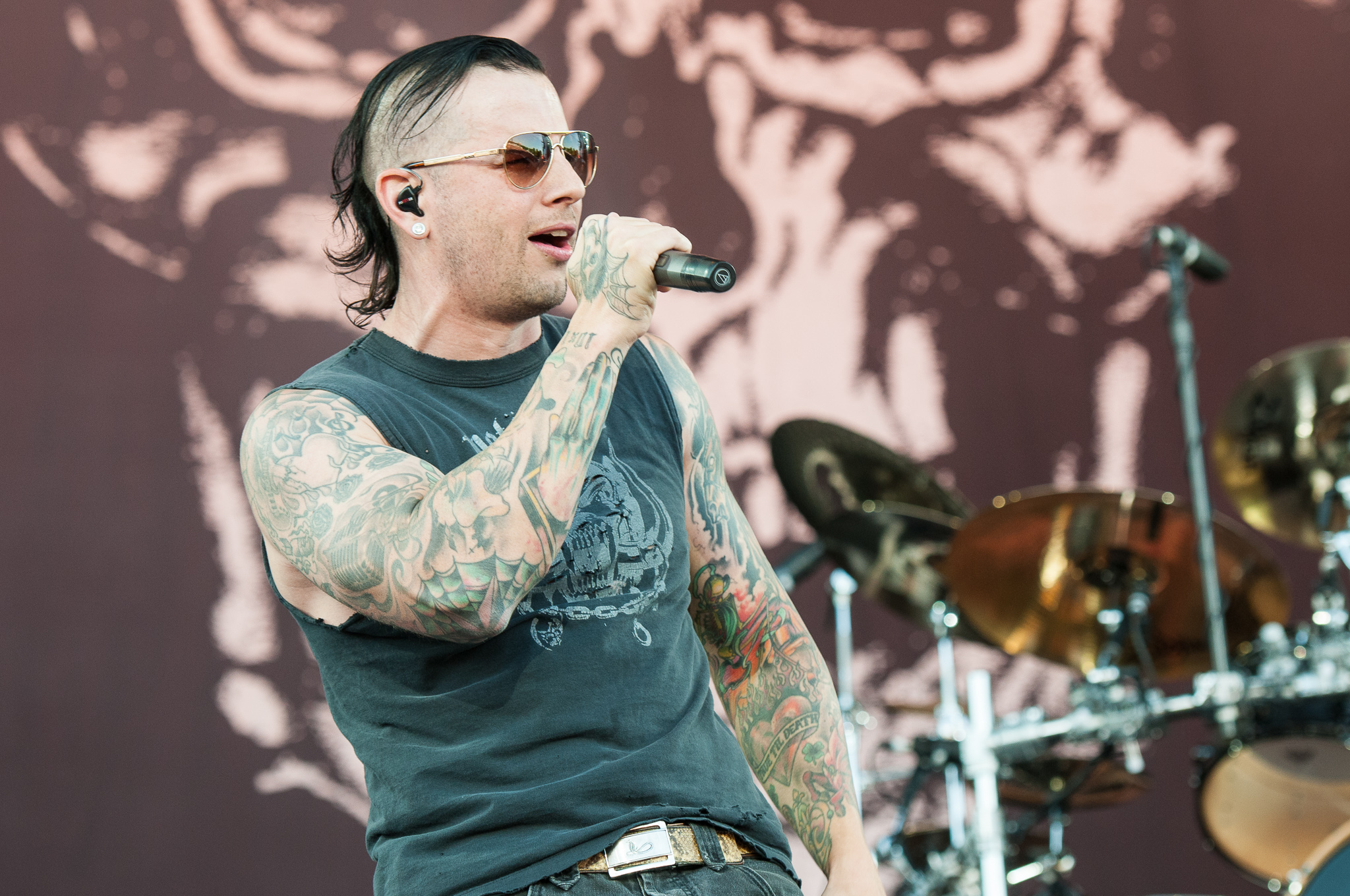 ARGO-Konzerte,Avenged Sevenfold,Konzert,Livekonzert,Livemusik,M. Shadows,Matthew Charles Sanders,Musik,RiP,Rock im Park 2014